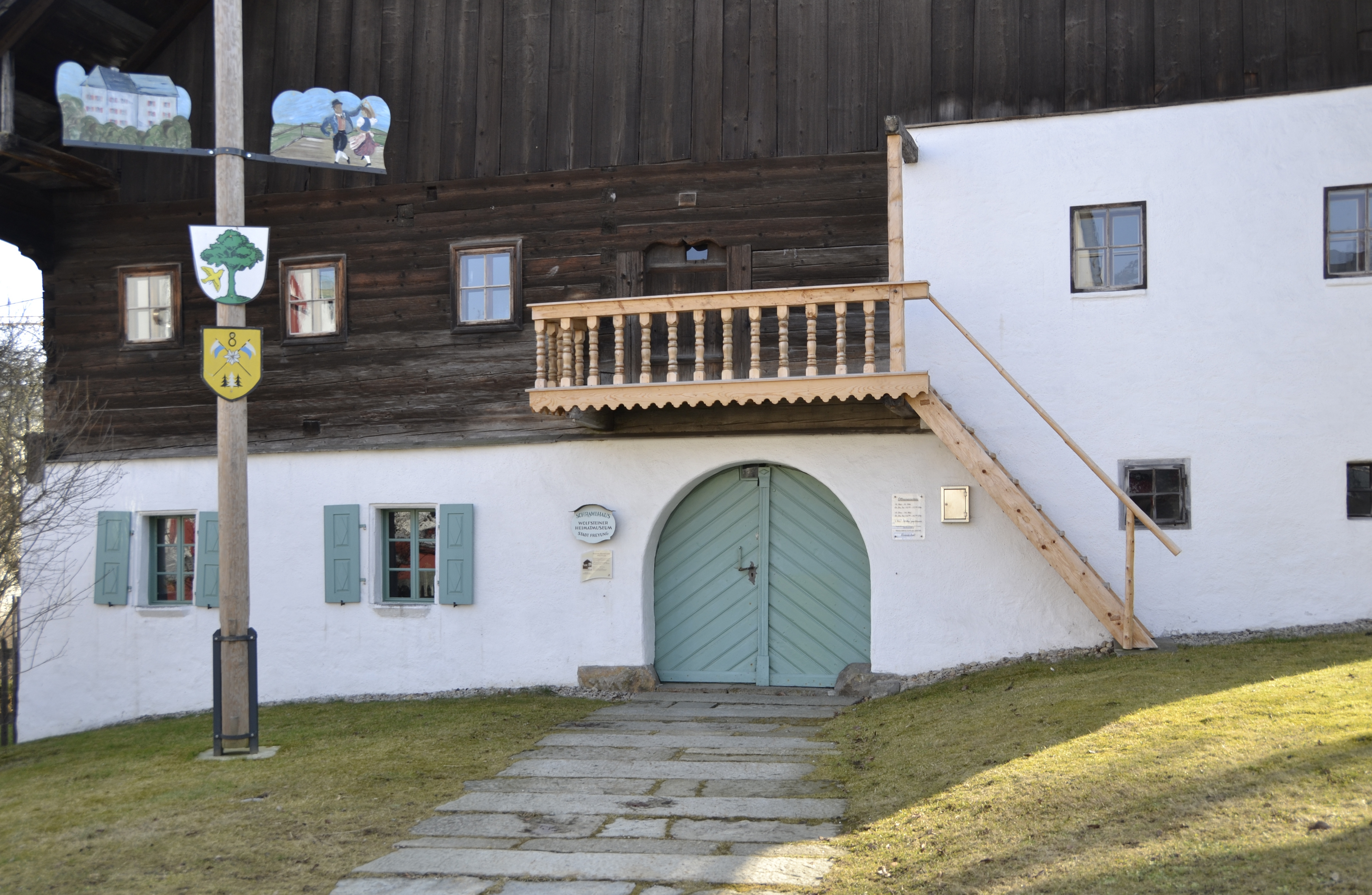 Das Schramlhaus "Wolfsteiner Heimatmuseum" (in der Abteistraße) in der Stadt Freyung im Bayerischen Wald.